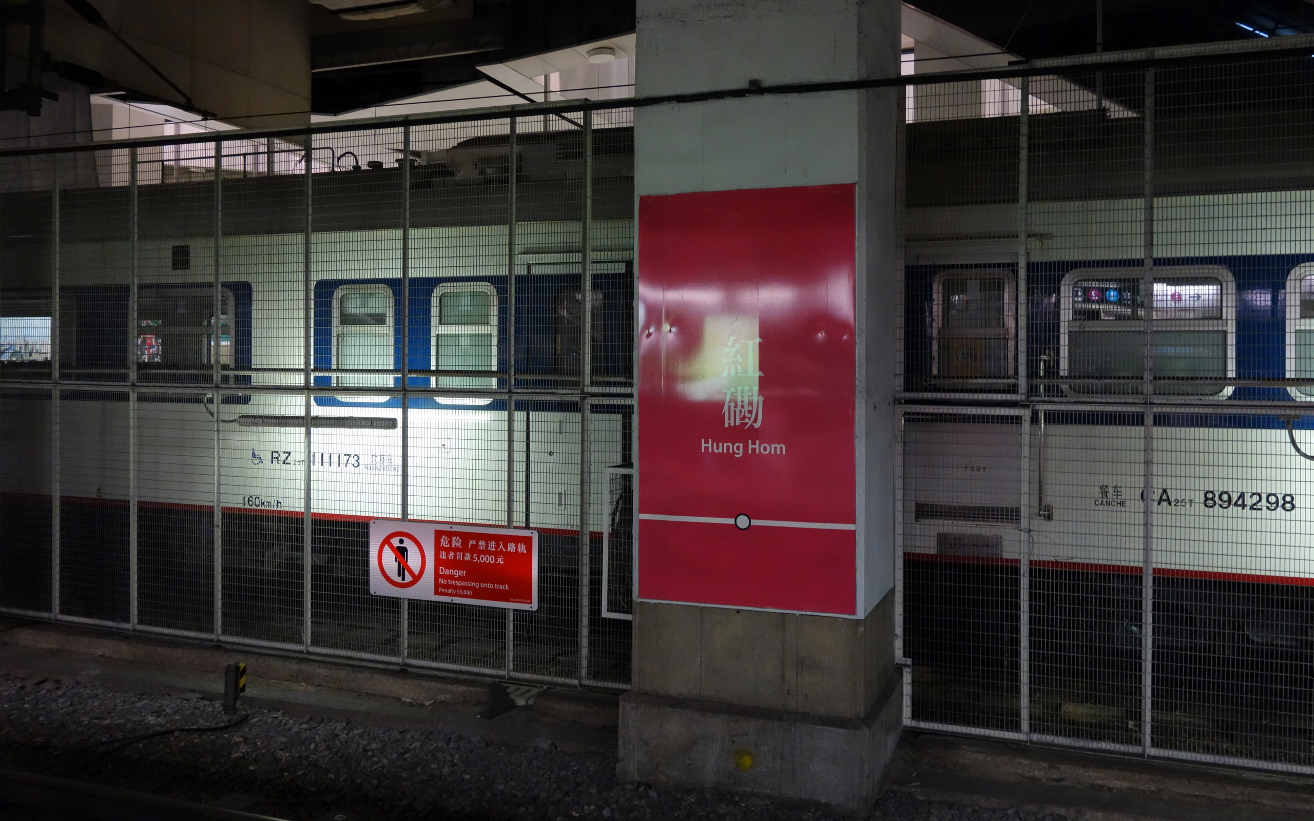 穗港直通車使用的25T型客车在香港九龍紅磡站